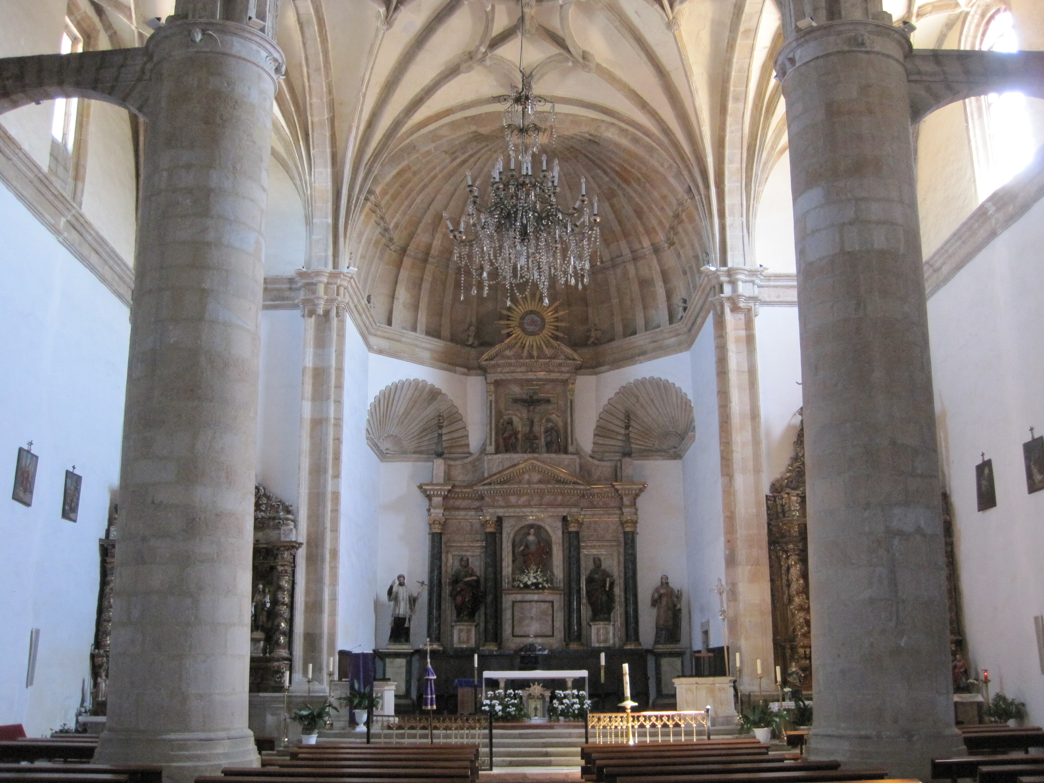 Vista del altar mayor de la nave principal de la iglesia de Santa Cecilia de Espinosa de los Monteros.